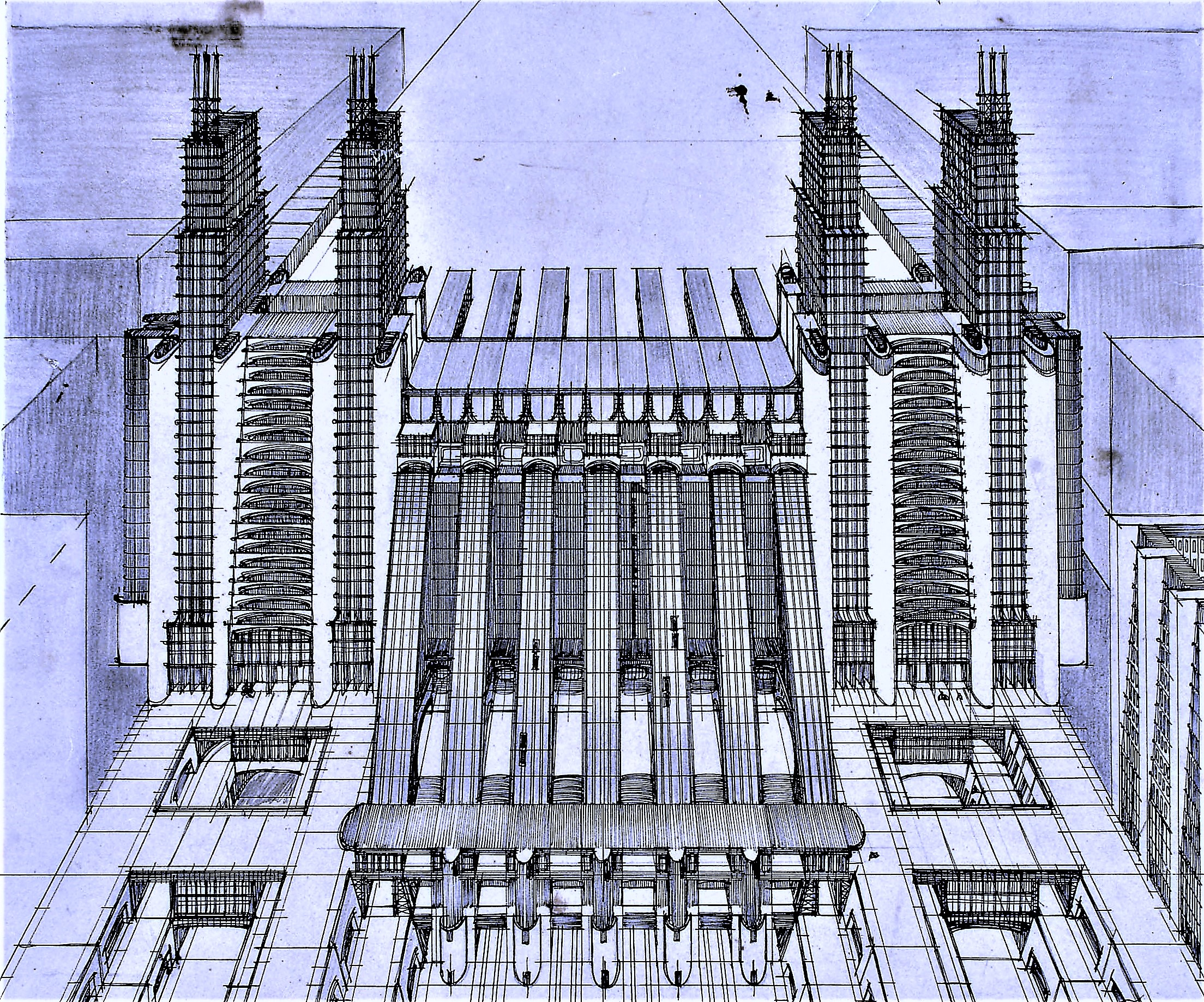 Antonio Sant'Elia, Citta nuova (image Commons modifiée)